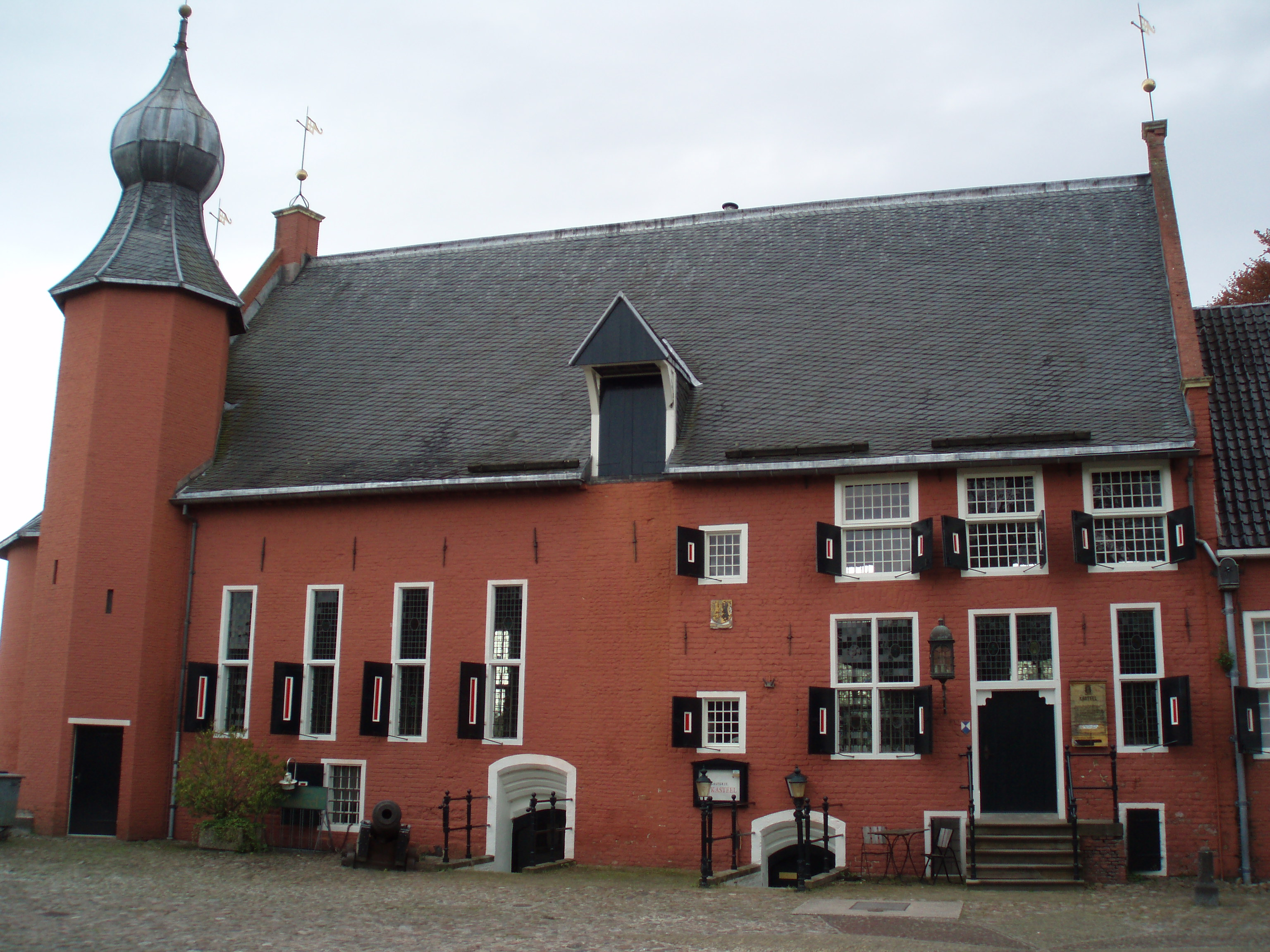 Kasteel van Coevorden in Coevorden.